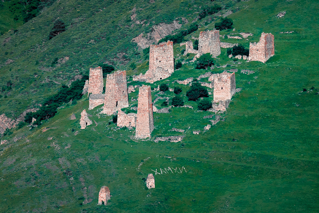 Башенный комплекс в древнем ингушском городе Хамхи (Джейрахский район, Ингушетия)